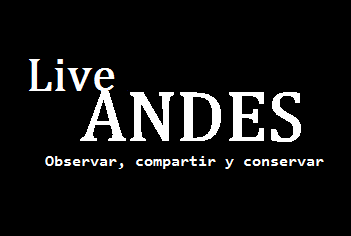 Cita al logo de LiveANDES